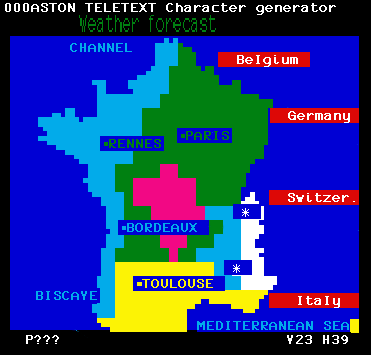 Image Vidéotex de type Ceefax